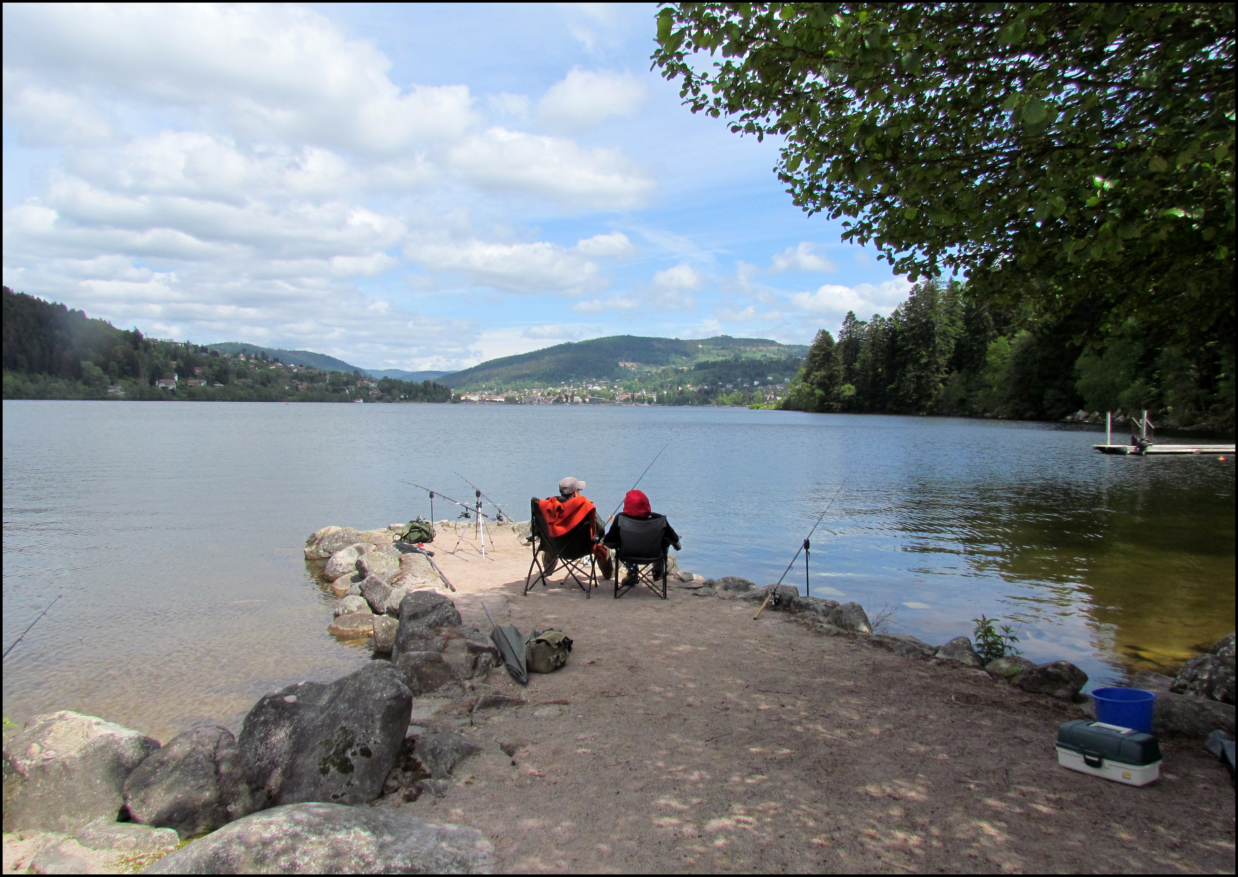 Pêcheurs sur la rive ouest du lac de Géradmer.